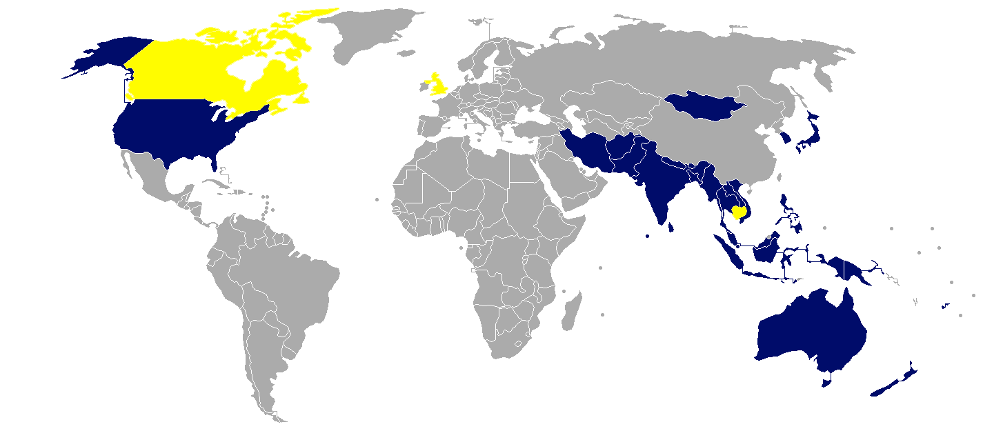 Mitglieder des Colombo-Plans + Ehemalige Mitglieder